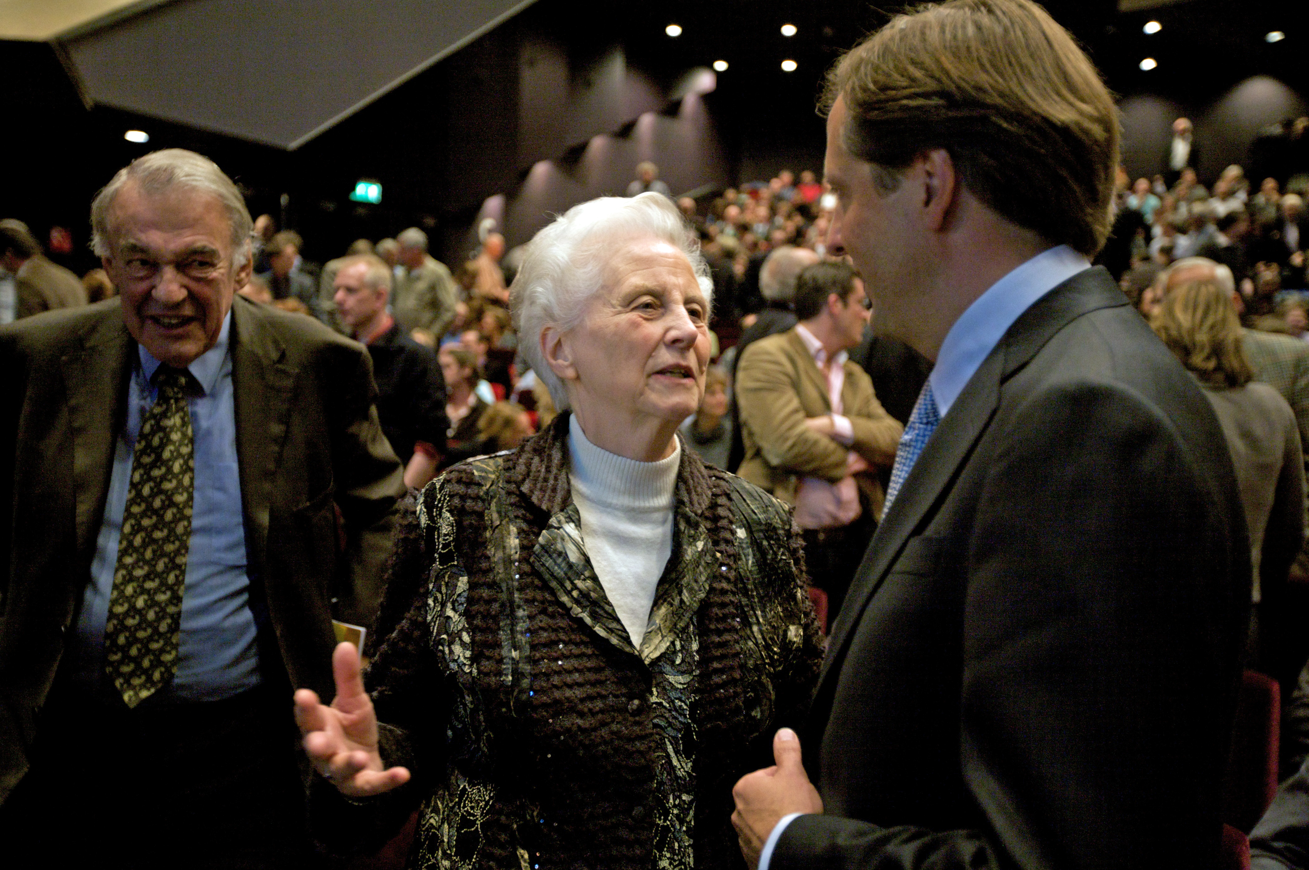 D66 congres 07-11-09 Breda